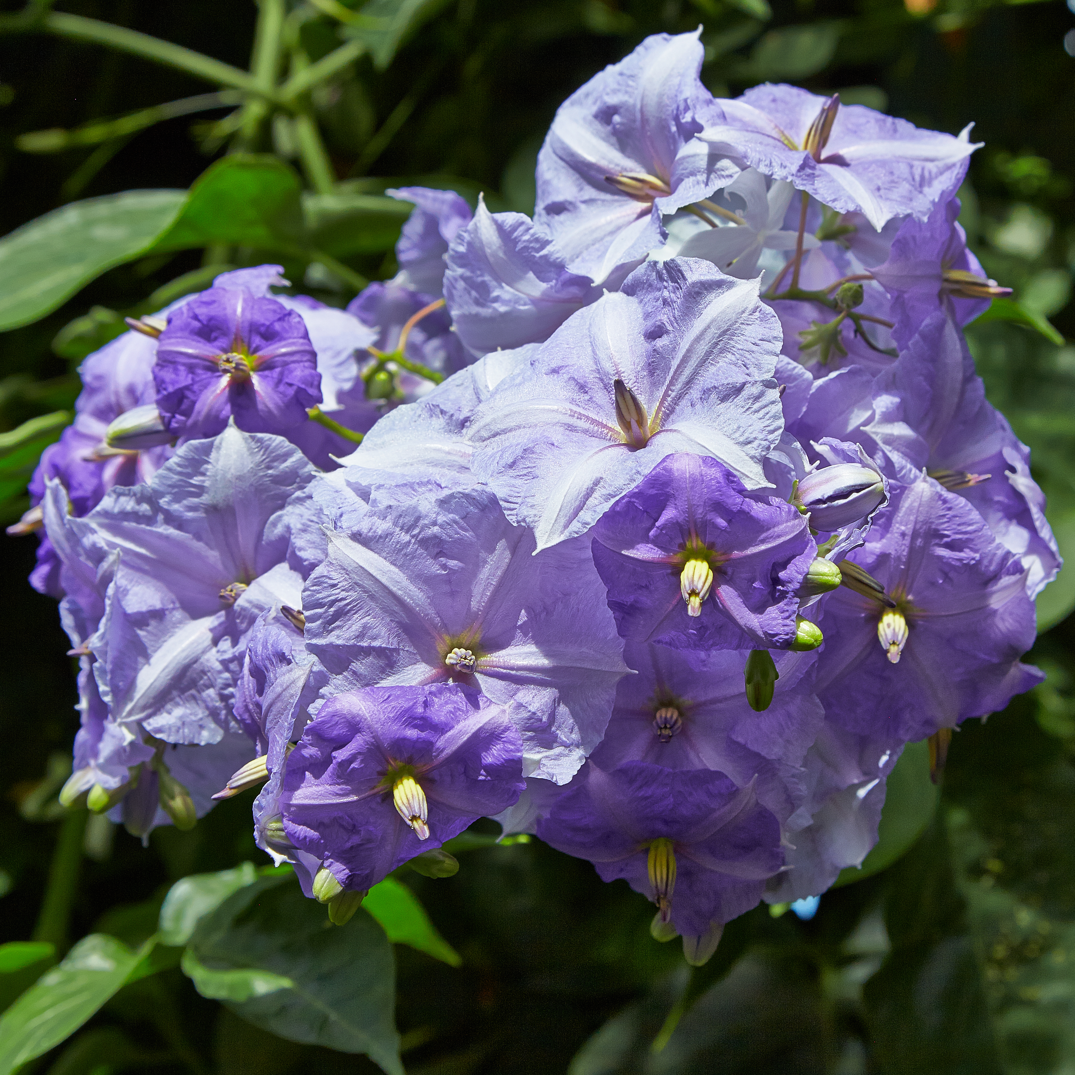 Solanum wendlandii identifierad med hjälp av befintlig skylt i Bergianska trädgården.